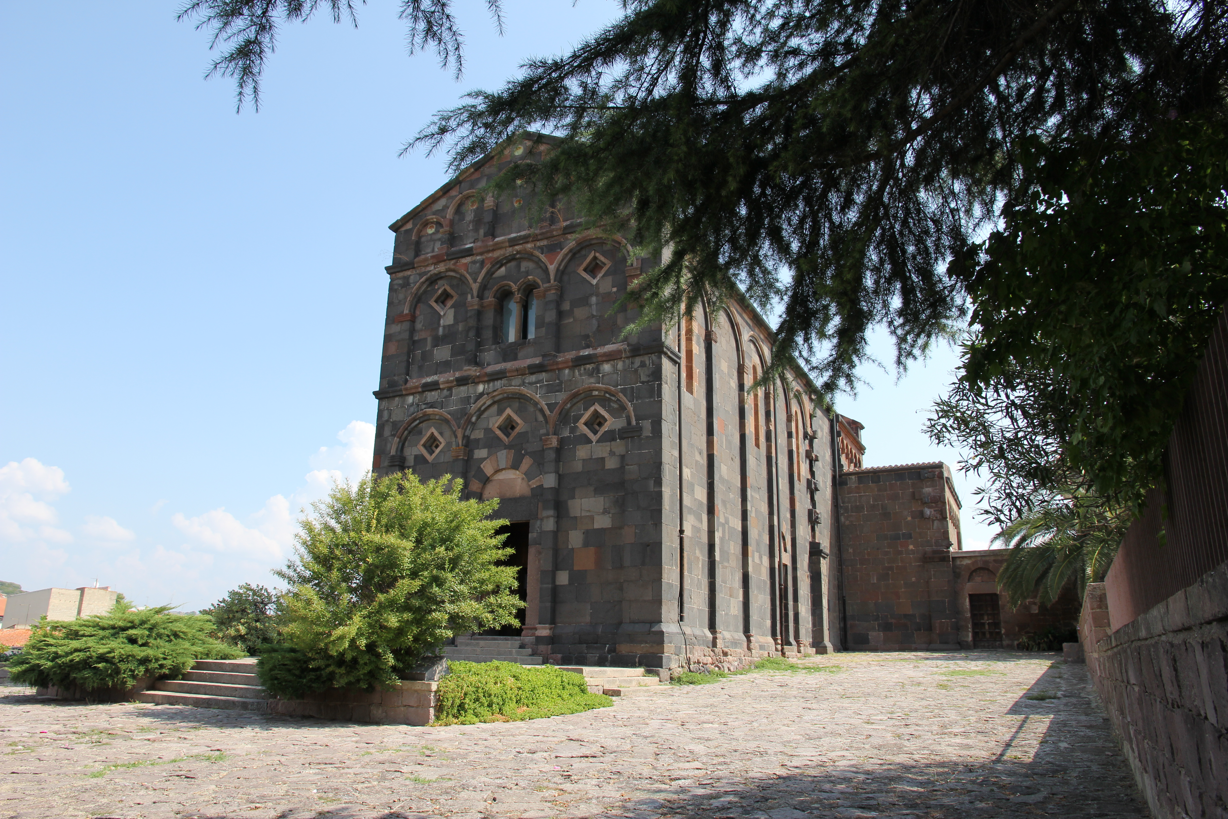 Ottana - Chiesa di San Nicola